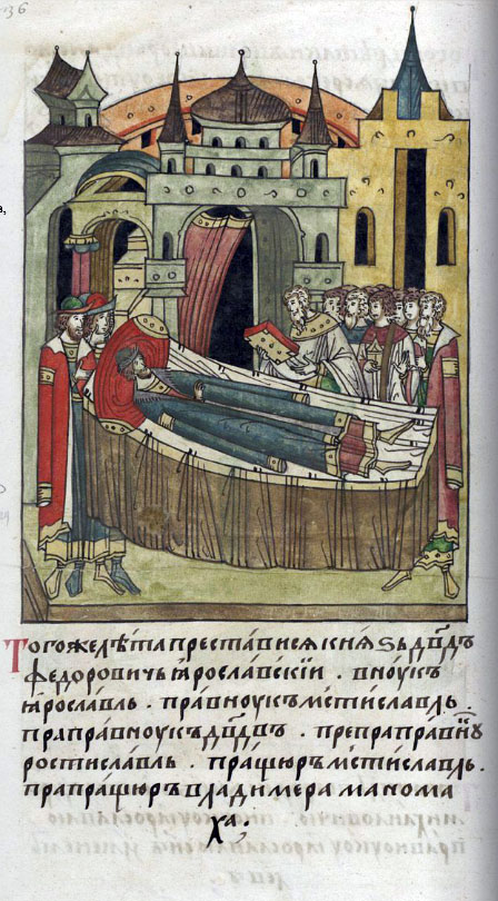 ЛИЦЕВОЙ ЛЕТОПИСНЫЙ СВОД В том же году преставился князь Давыд Федорович Ярославский, внук Ярославов, правнук Мстиславов, праправнук Давыдов, препраправнук Ростиславов, (потомок) пращура Мстислава, прапращура Владимира Манамаха.